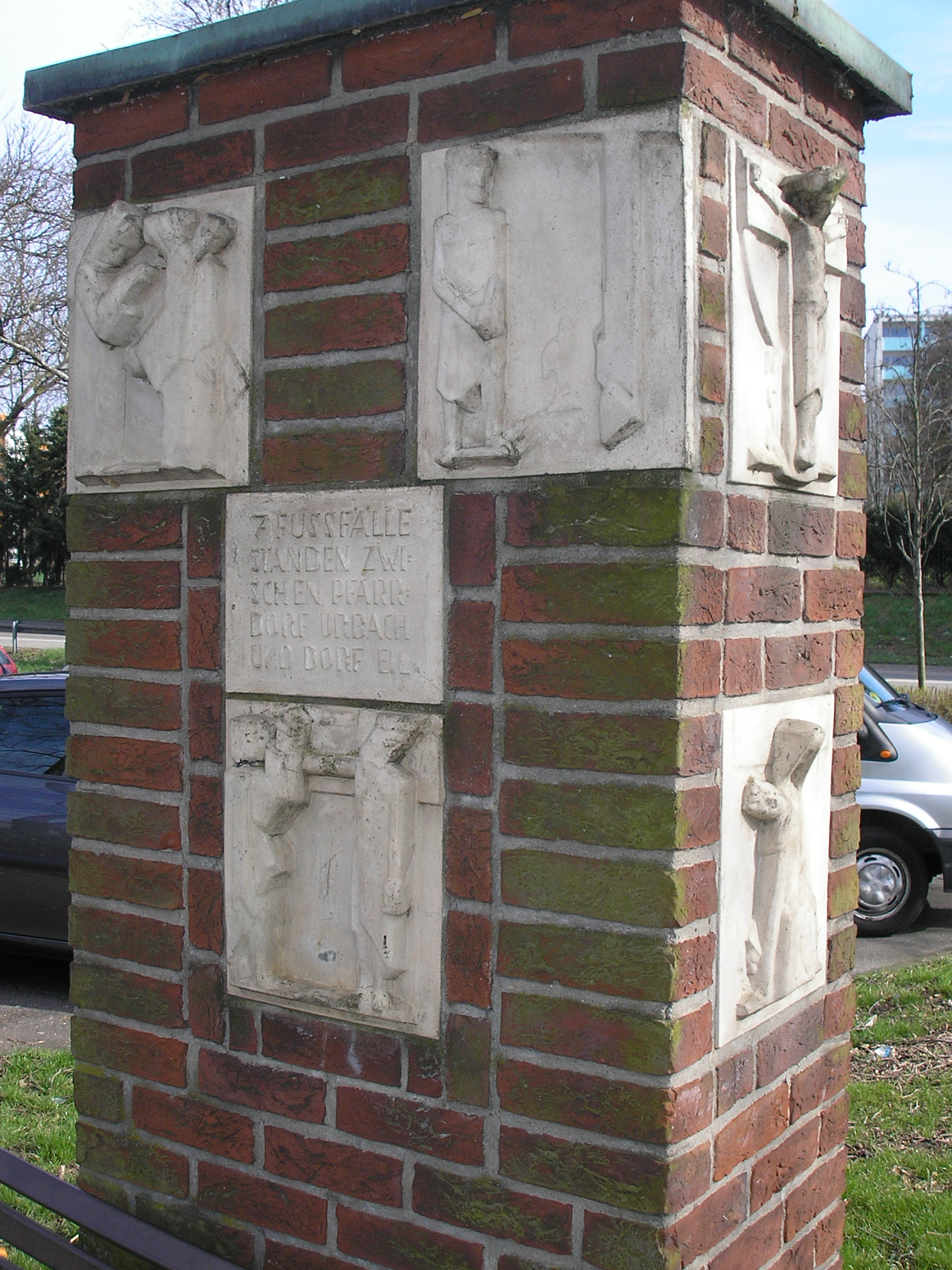 Gedenkstein für die sieben Fussfälle in Köln-Porz-Urbach. Inschrift: 7 Fussfälle standen zwischen Pfarrdorf Urbach und Dorf Eil